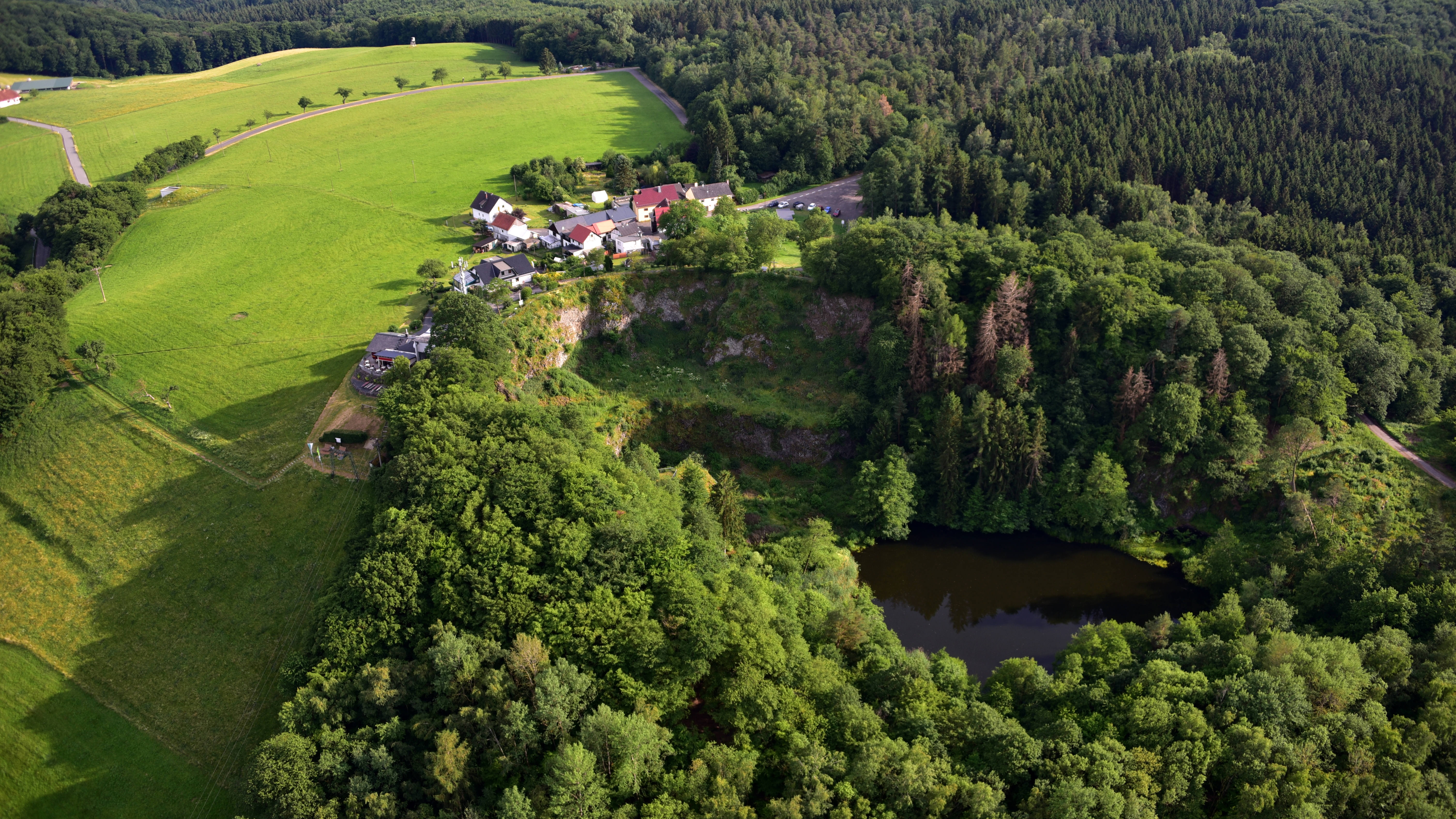 Hausen (Wied), Ortsteil Hähnen